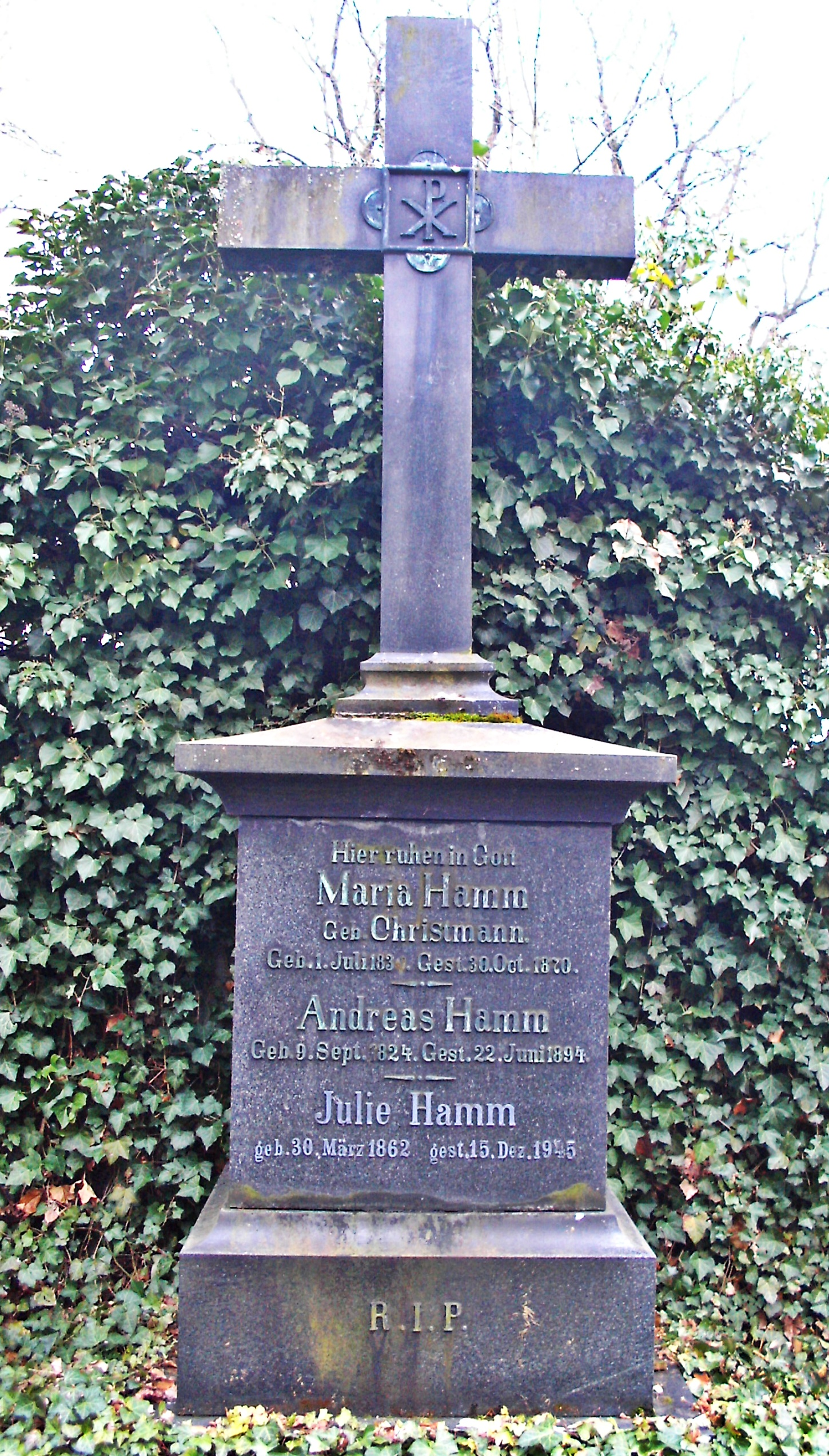 Grab von Andreas Hamm (1824-1894), Glockengießer und Fabrikant, Hauptfriedhof Frankenthal (Pfalz)